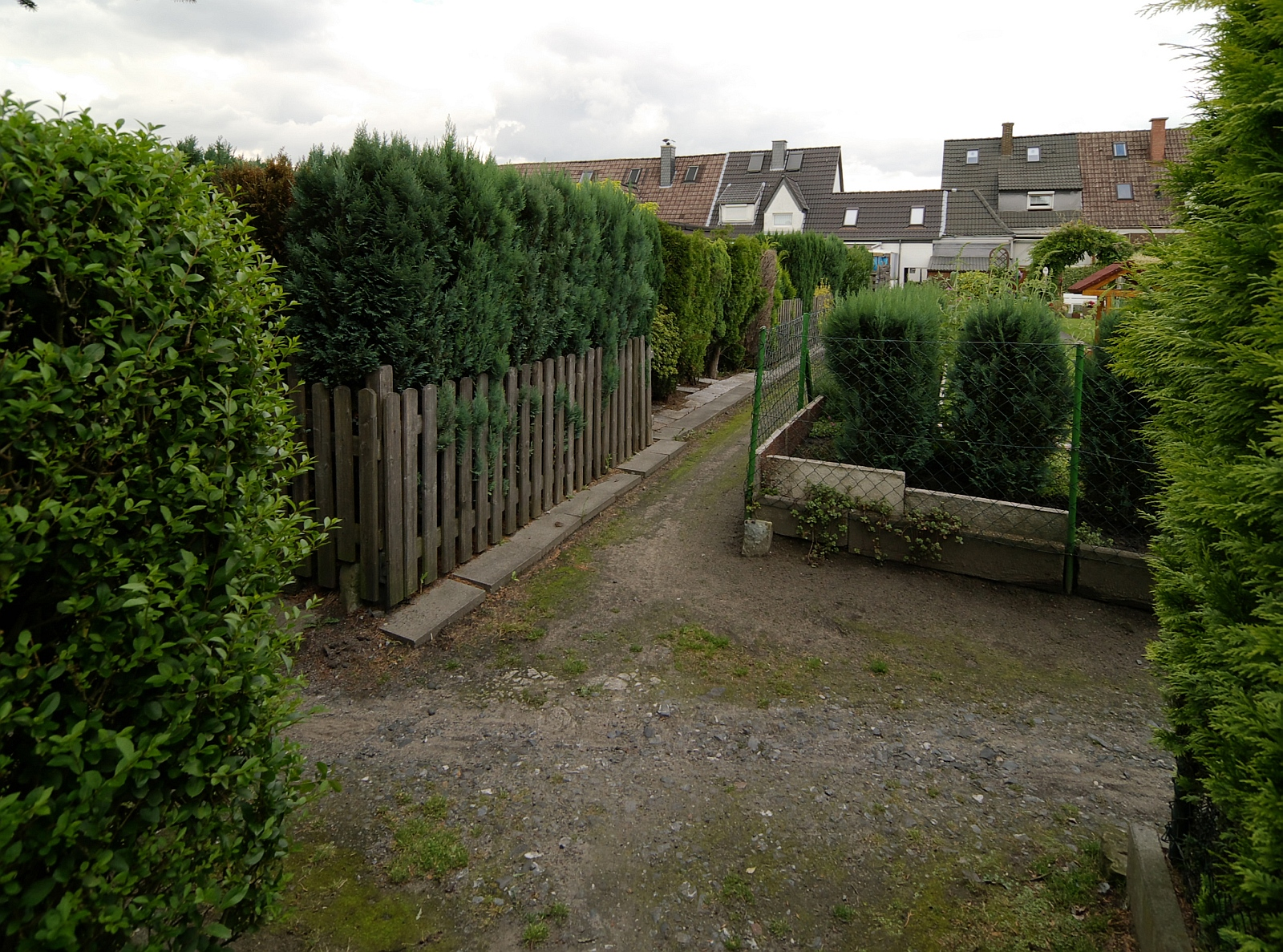 "Siedlung am Kanal", Arbeitersiedlung in Lünen, Nordrhein-Westfalen. Teil der Route der Industriekultur. Verbindungswege zwischen den hinter den Häuserzeilen gelegenen Gärten